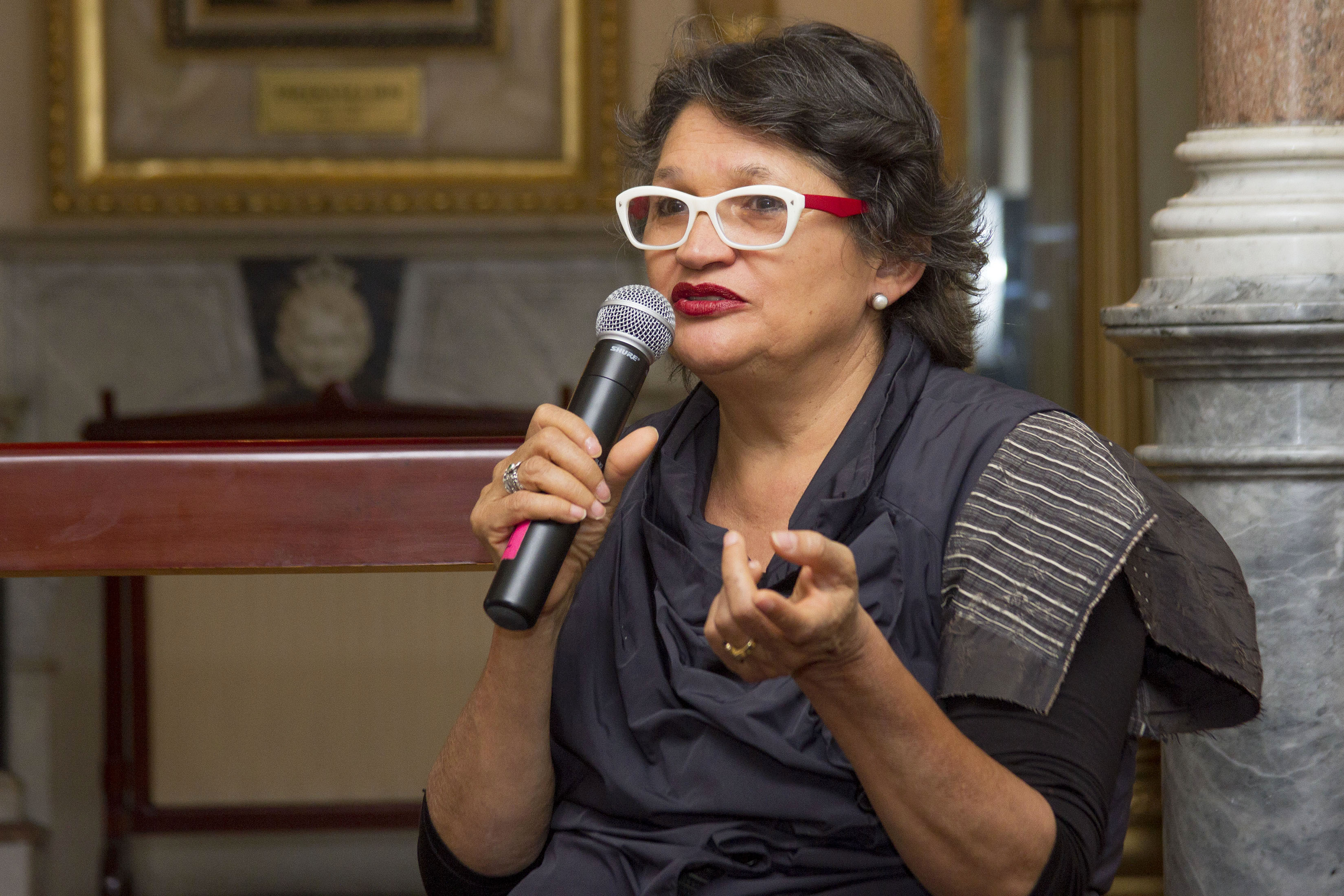 Jueves 17 de marzo 2016. Conferencia de prensa en el Foyer del Teatro de la Ciudad Esperanza Iris, para anunciar la presentación de la ópera para niños El día que María perdió la voz de Marcela Rodriguez, bajo la dirección de Jesusa Rodriguez la cual se escenificara en el marco del Festival del Centro Histórico. Fotografía: Tania Victoria/Secretaría de Cultura CDMX.